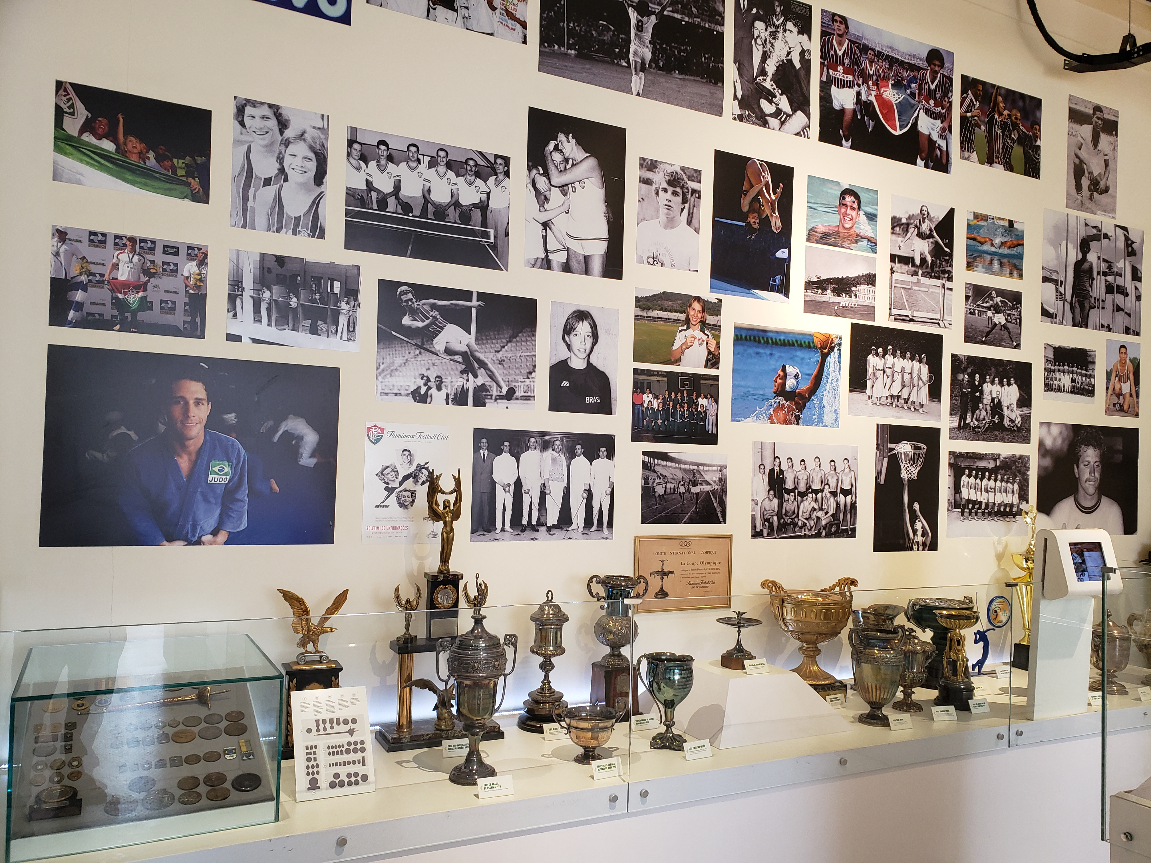 Troféus destacados nos esportes olímpicos conquistados pelo Fluminense Football Club em exposição em sua Sala de Troféus.